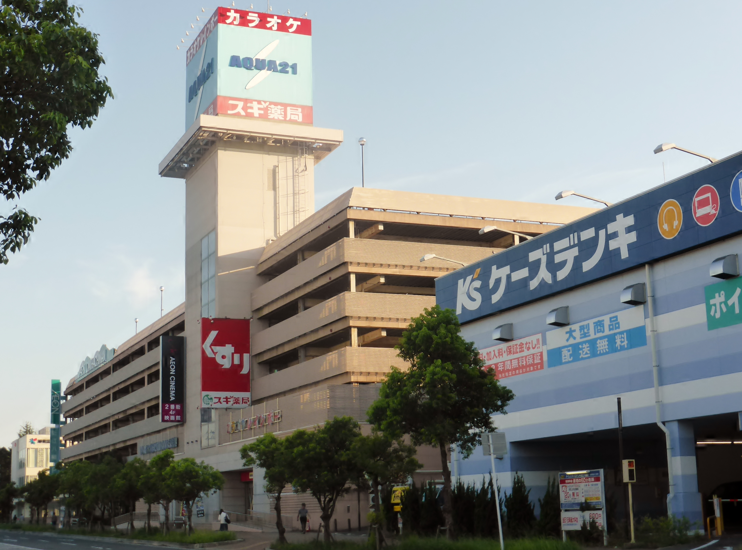 イオンシネマ転換後のイオン近江八幡ショッピングセンター2番街を撮影。